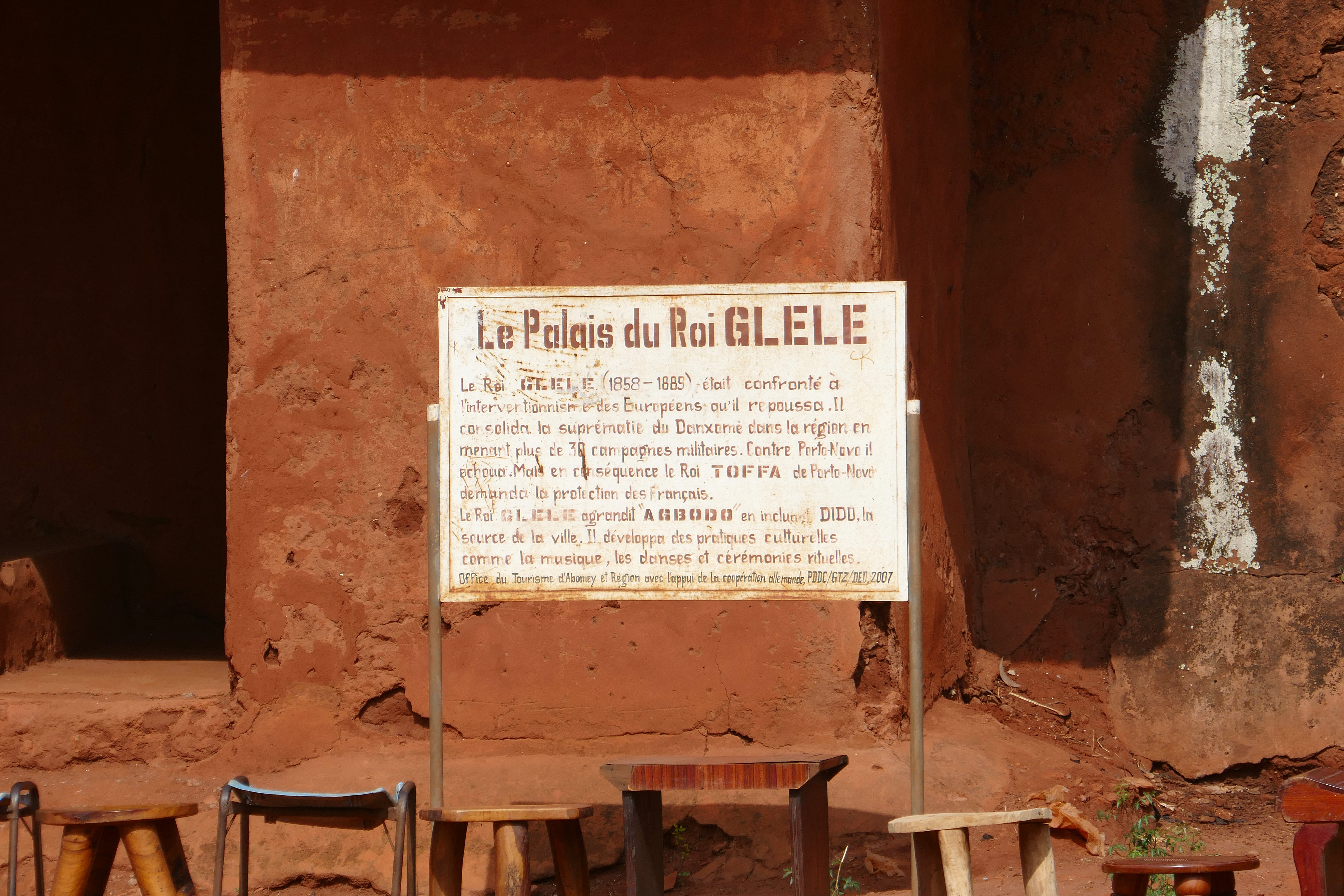 Palais du roi Glèlè à Abomey (Bénin),dans l'enceinte du Musée historique.